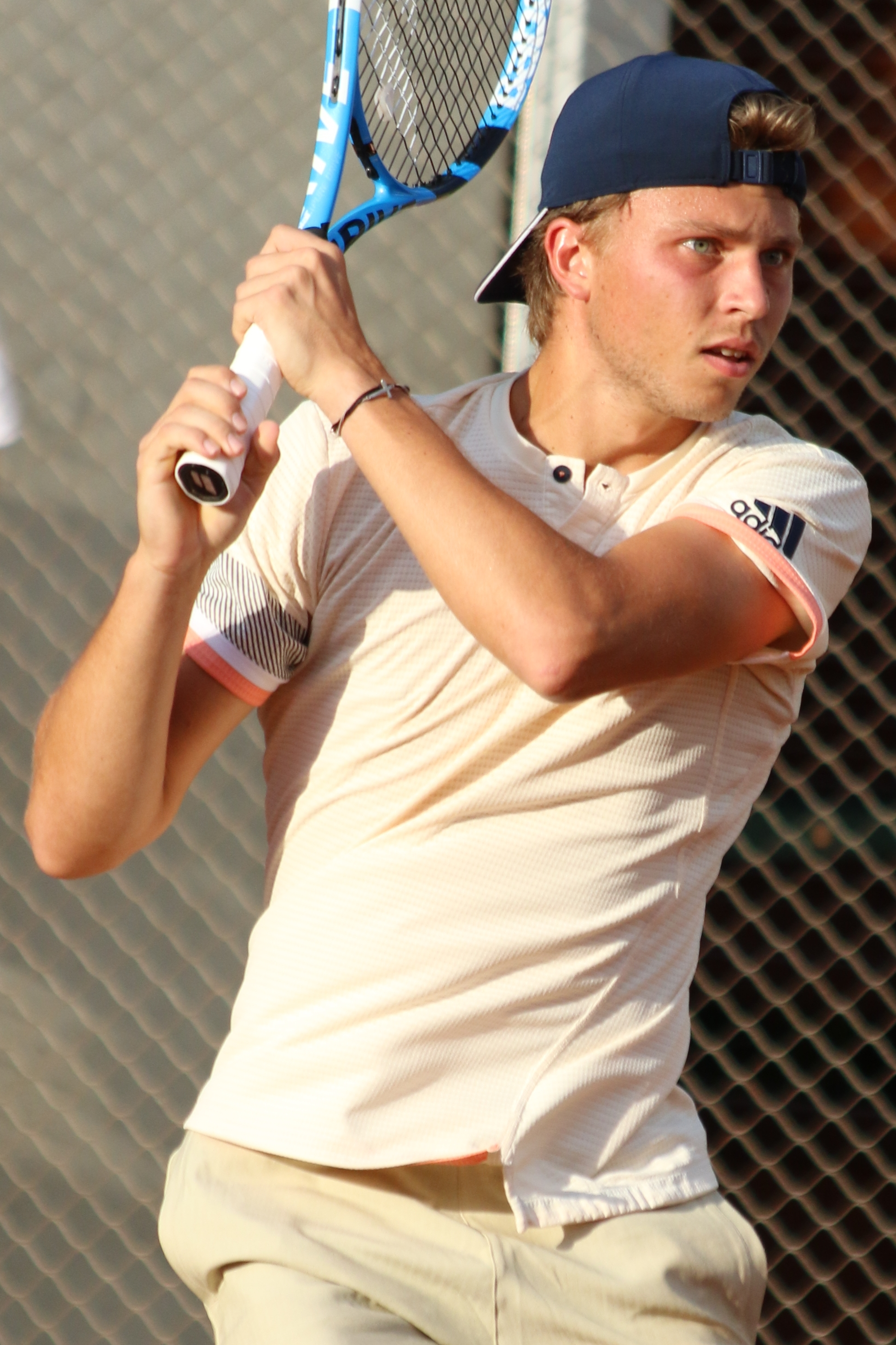 Muller A. RG18 (15)